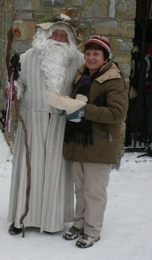 Alena Bartošíková a Bílý Karpat při uzavírání lopenické rozhledny.